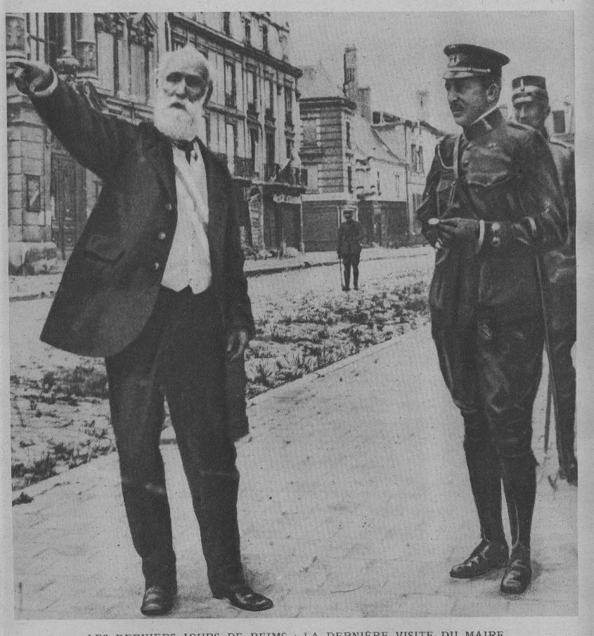 Le docteur Jean-Baptiste Langlet, dans les rue de sa ville, Reims.